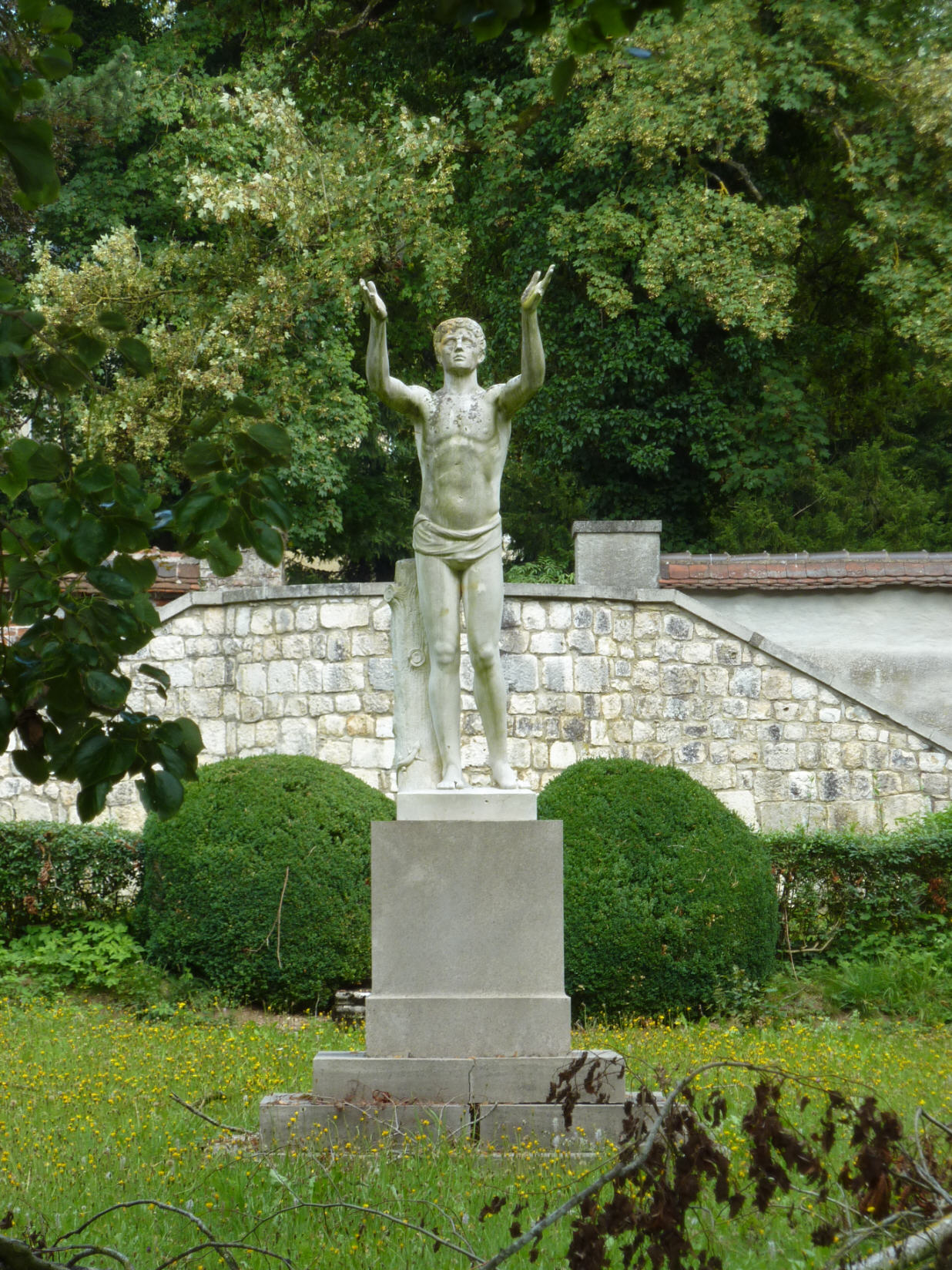 Blick in den Park von Schloss Taxis